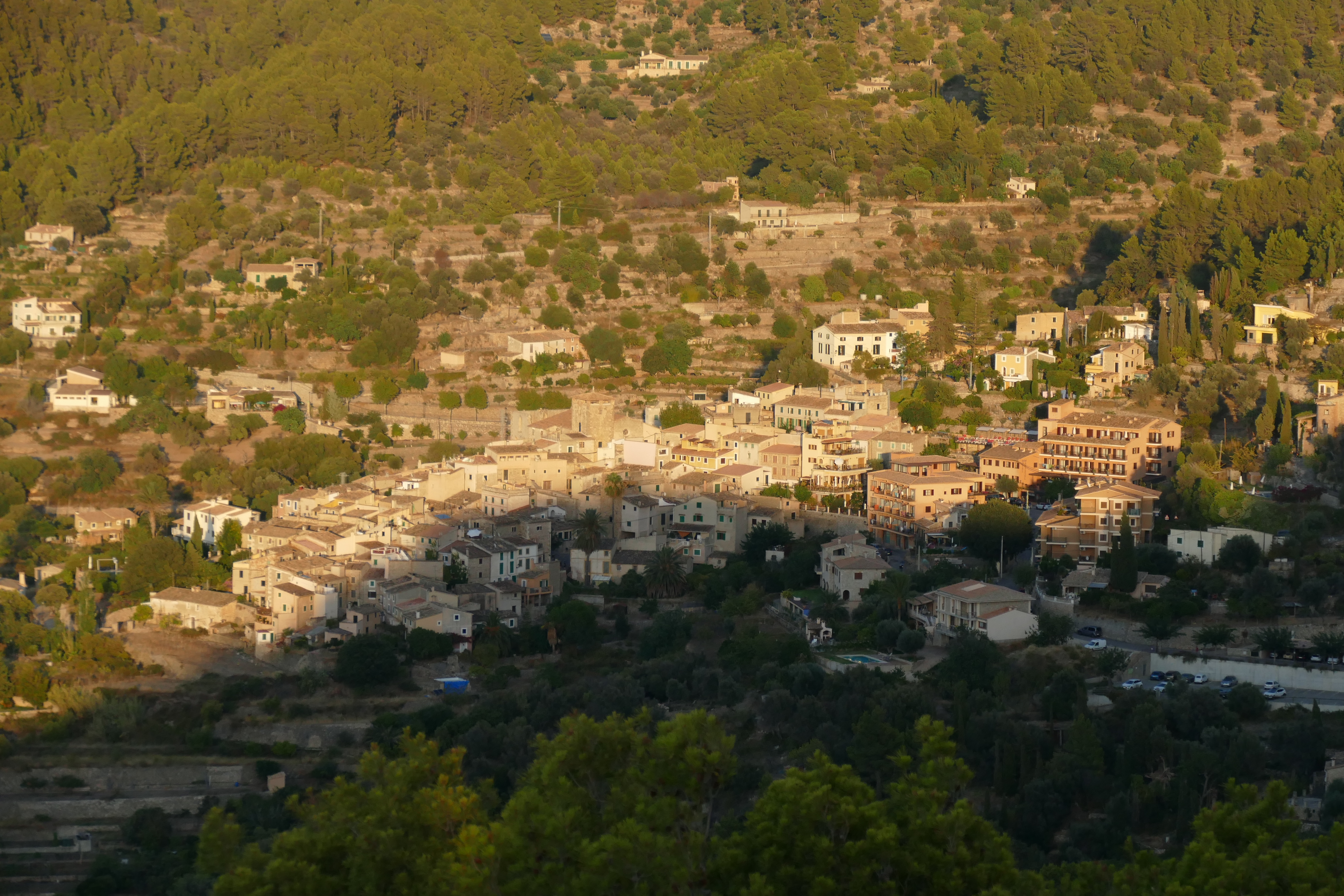 Blick auf Estellencs beim Sonnenuntergang